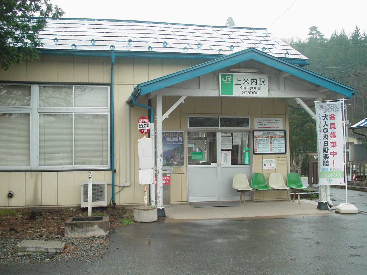 （上米内駅）